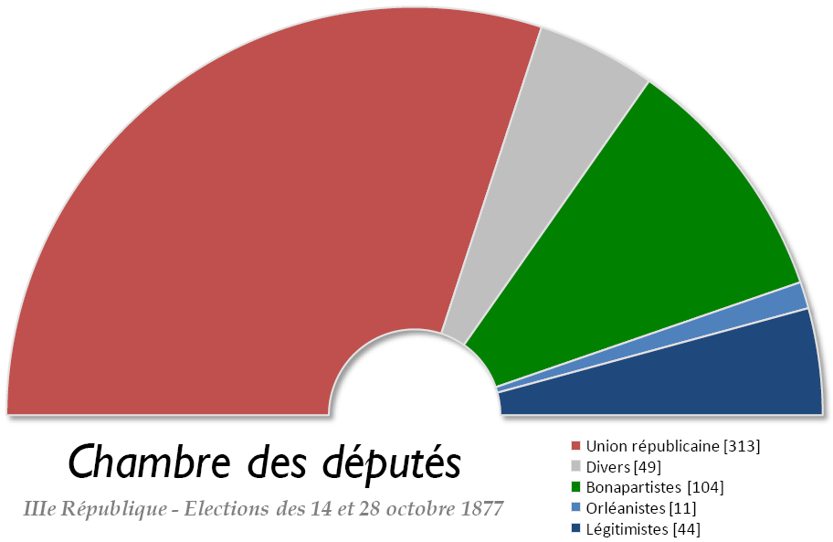 Chambre des députés française issue des élections législatives de 1877